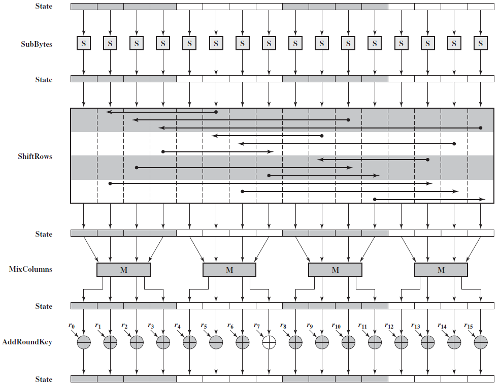 AES 암호화 라운드